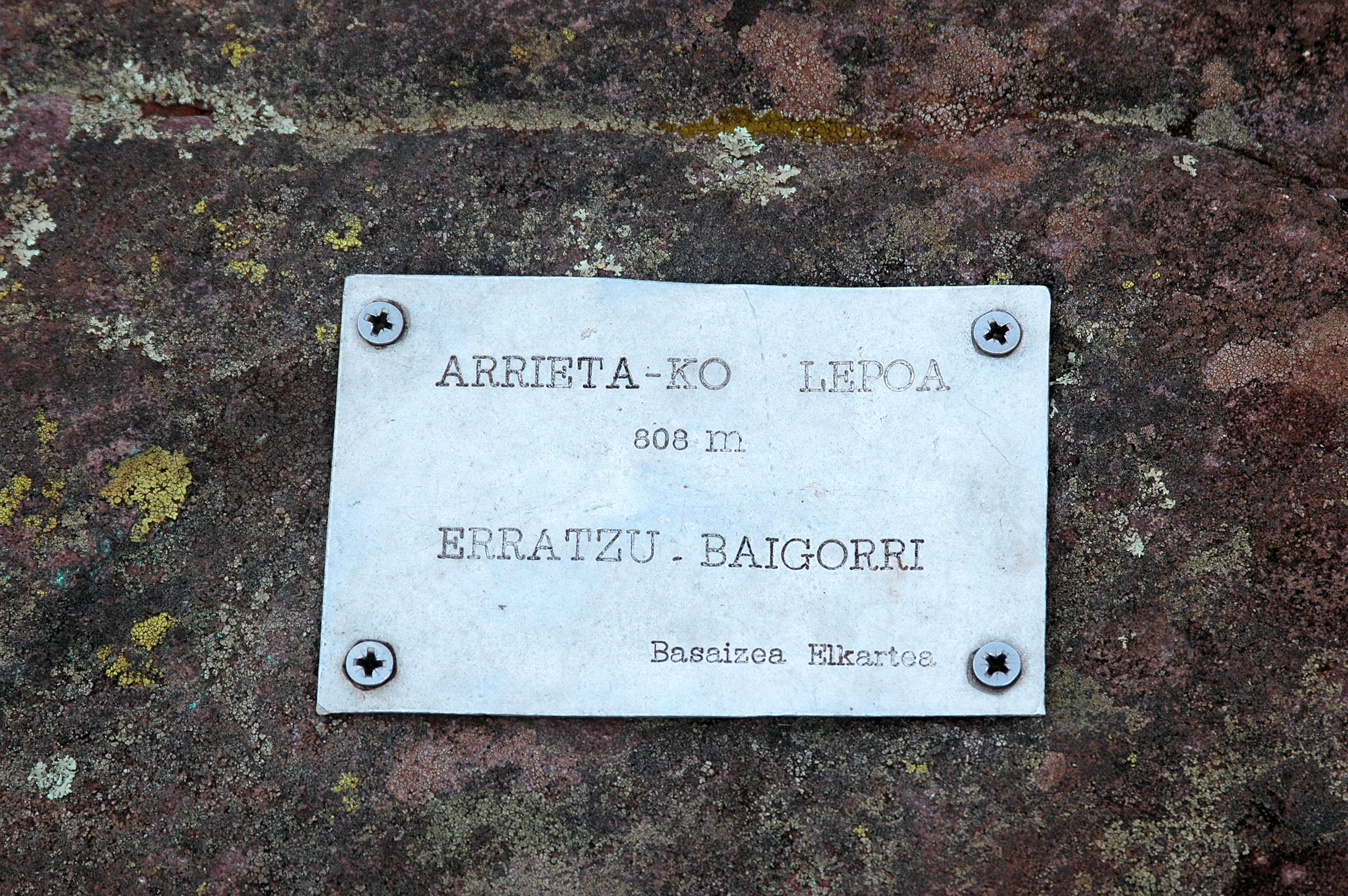 Saint-Étienne-de-Baïgorry, plaque sur le GR10 au col d'Harriéta. Photo prise le 11/08/06 par Harrieta171